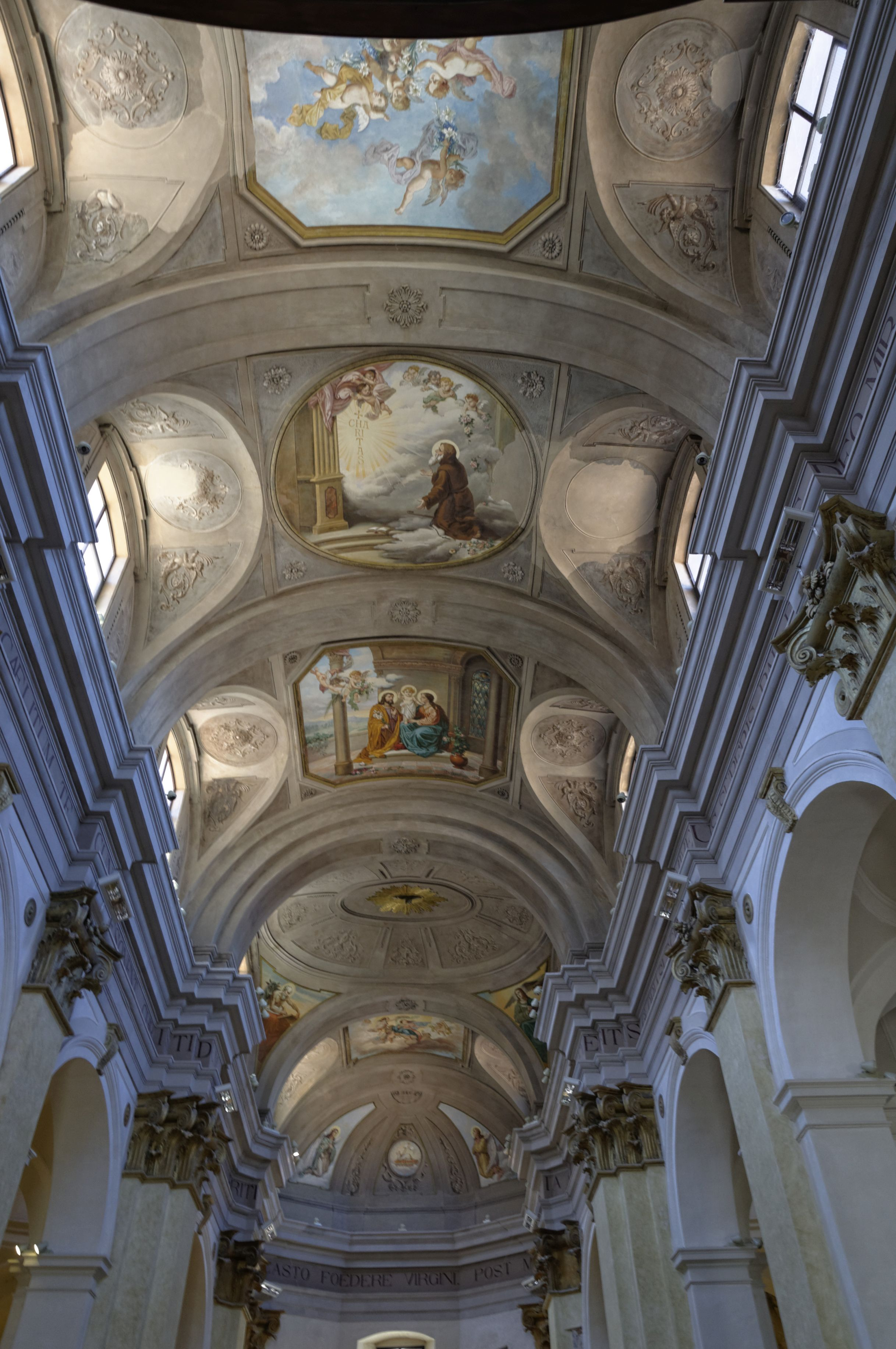 L'Aquila 2017 Dieses Foto entstand in Zusammenarbeit mit Stadtbesichtigungen.de Die Seiten Stadtbesichtigungen.de, der dazugehörige Reise Blog sowie die Facebookseite: Stadtbesichtigungen Rom dürfen dieses Bild für Ihre Veröffentlichungen ohne den Hinweis auf Wikipedia, Commons bzw der Lizenz verwenden. Die Verantwortlichen habe von mir (Ra Boe) die Originaldaten zur freien Verfügung übermittelt bekommen.